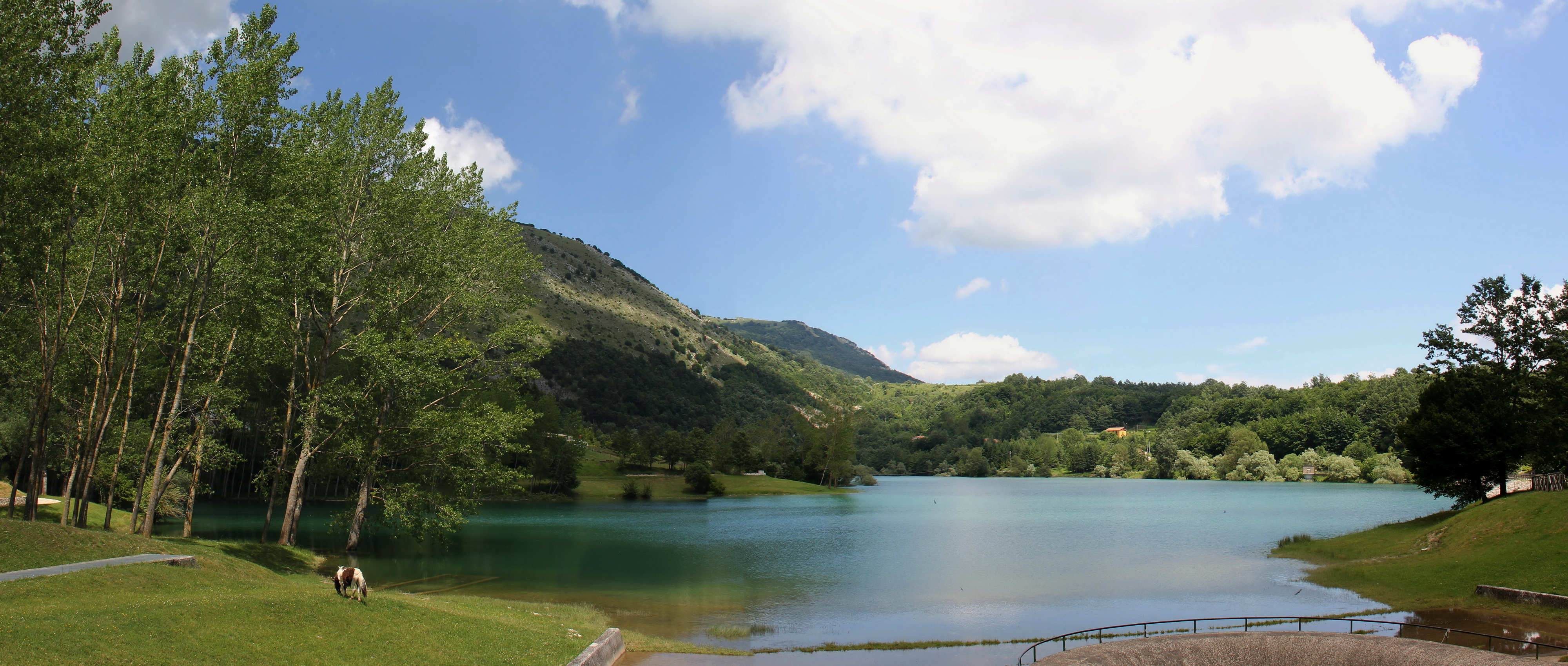 Lago Selva, Fontana Cicchetta, Frosinone, Lazio, Italy